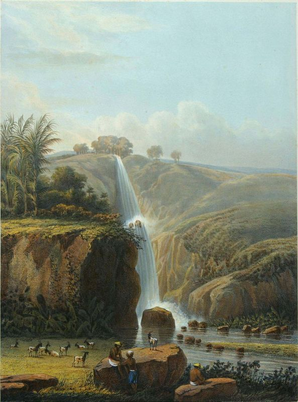 Litho. Litho naar een oorspronkelijk schilderij van A. Salm.. De Singahan waterval met geiten op de voorgrond